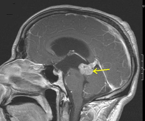 Niedrigmalignes Astrozytom des Mittelhirns (Lamina tecti). T1-gewichtete Kernspintomographie in sagittaler Orientierung, nach Kontrastmittelapplikation. Der Tumor ist mit einem Pfeil markiert. Die Liquorräume vor dem Tumor sind erweitert im Sinne eines kompressionsbedingten Hydrozephalus internus.